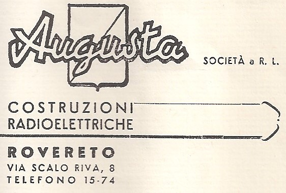 L'immagine del logo societario della società Augusta Costruzioni Radioelettriche nel 1950